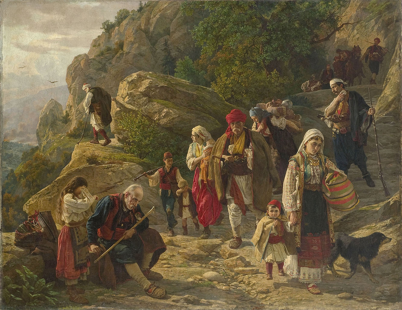 Херцеговачки бегунци, рад Уроша Предића из 1889. године